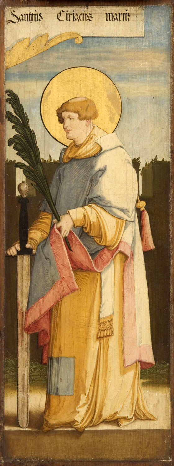 Ausstattung der ehemaligen Seitenaltäre der Meßkircher St. Martinskirche, Standflügel: Heiliger Cyriakus mit Schwert und Palme Eingescannt aus: Anna Moraht-Fromm und Hans Westhoff: Der Meister von Meßkirch – Forschungen zur südwestdeutschen Malerei des 16. Jahrhunderts, Ulm, 1997, S. 175 rechts